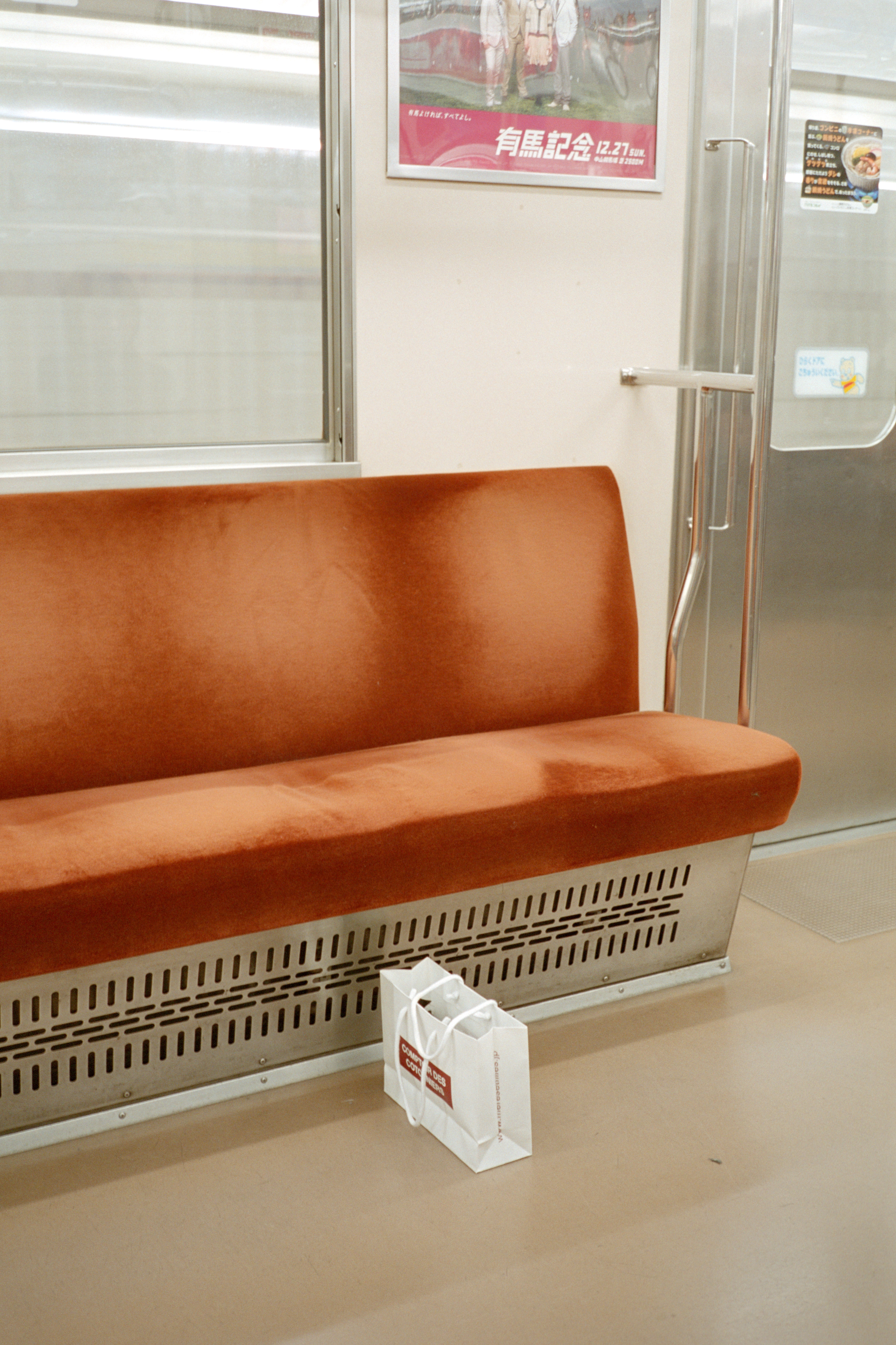 迷ってたらおばちゃんが忘れ物扱いしてた